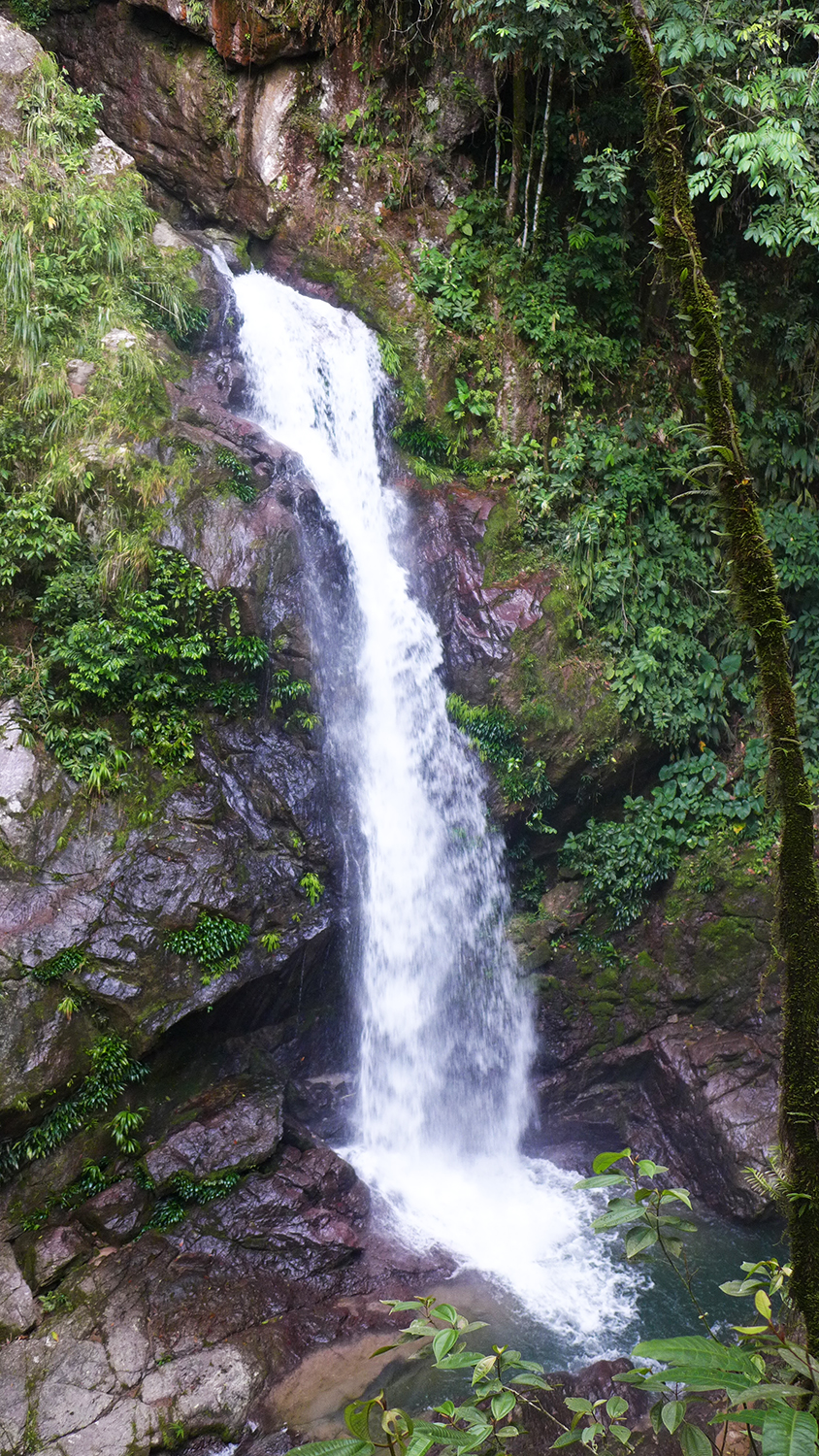 OTORONGO